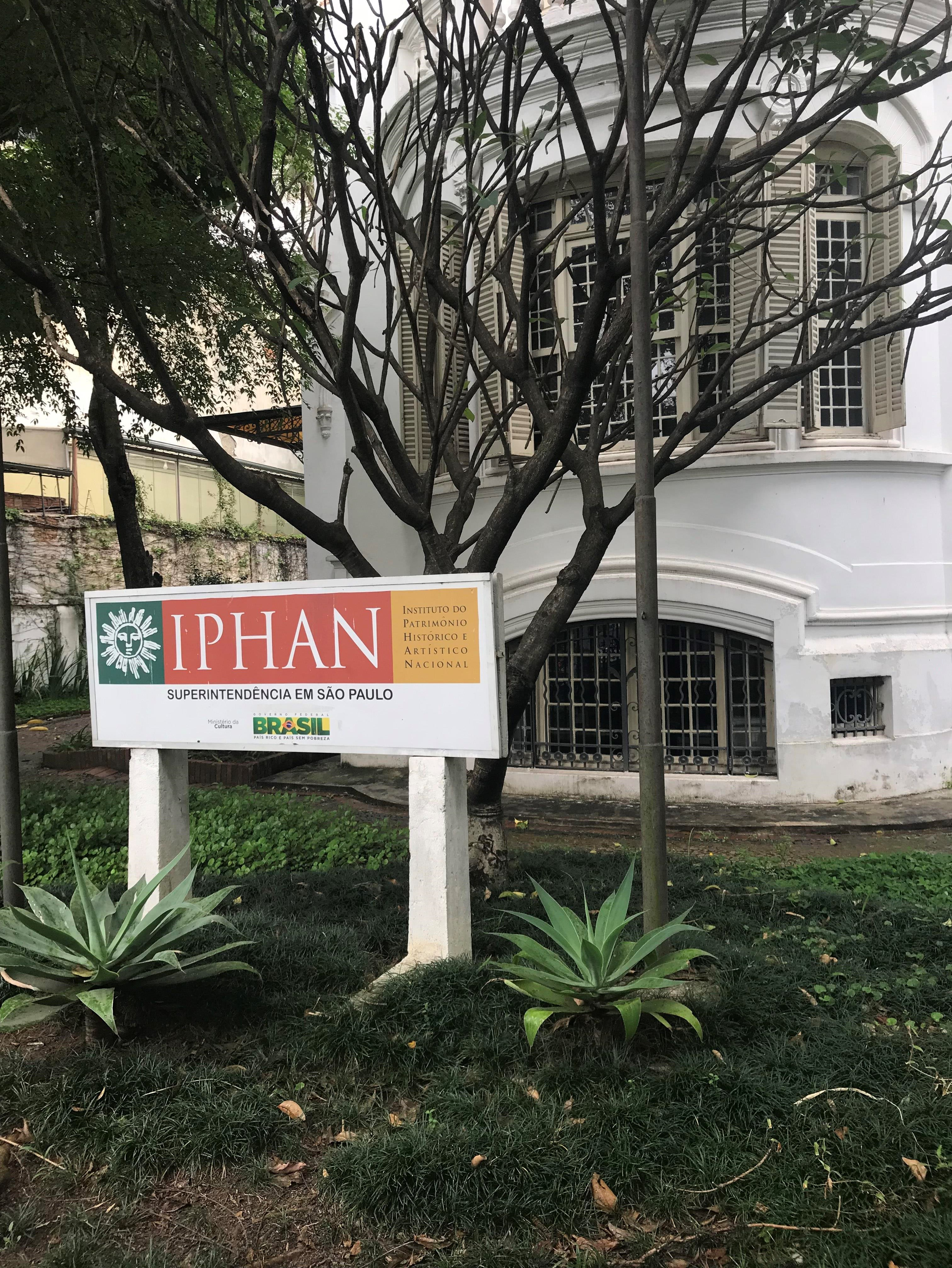 Casa de Dona Sebastiana de Souza Queiroz foi construído em 1910 pelo Escritório Técnico de Ramos de Azevedo, para servir de residência de Sebastiana de Souza Queirós, neta do barão de Limeira. Desde 2010, o edifício é ocupado pela superintendência paulista do Iphan (Instituto do Patrimônio Histórico e Artístico Nacional).